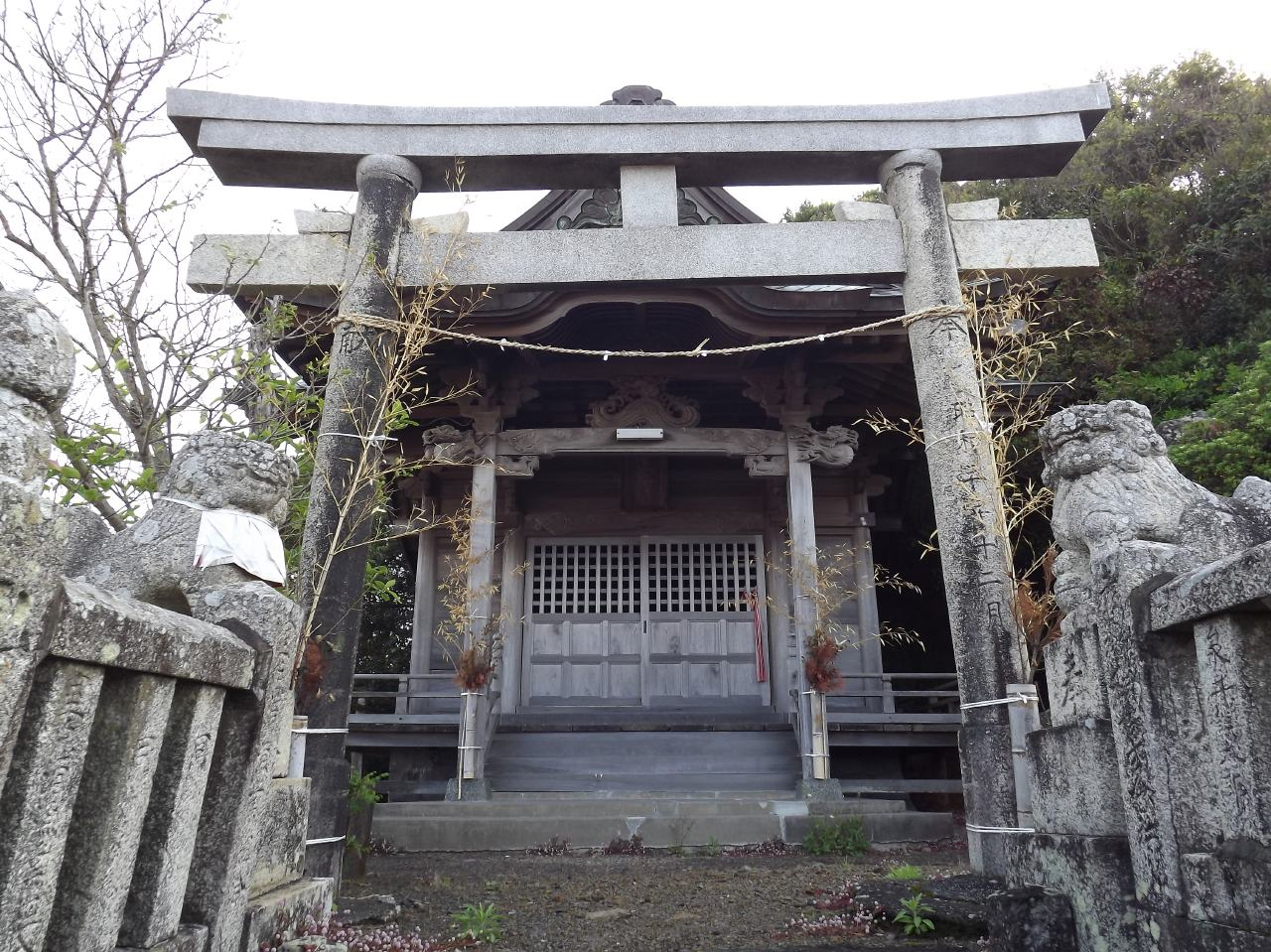 室戸市 一木神社